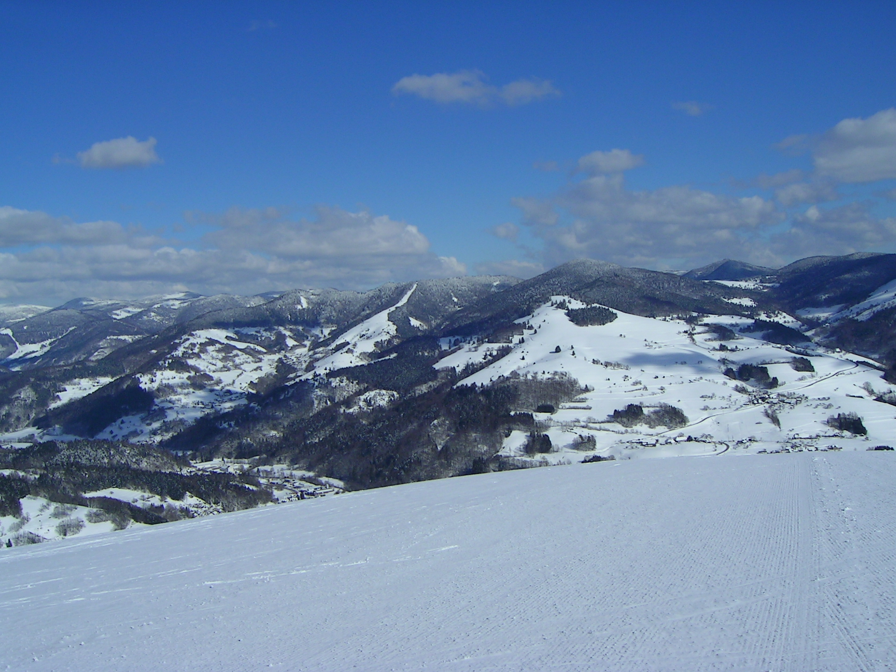 Aussicht vom Ittenschwander Horn im Winter